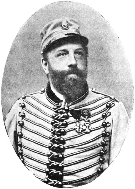 "Le marquis de Valcarlos" [Raimundo Güell y de Borbon, marquis de Valcarlos].